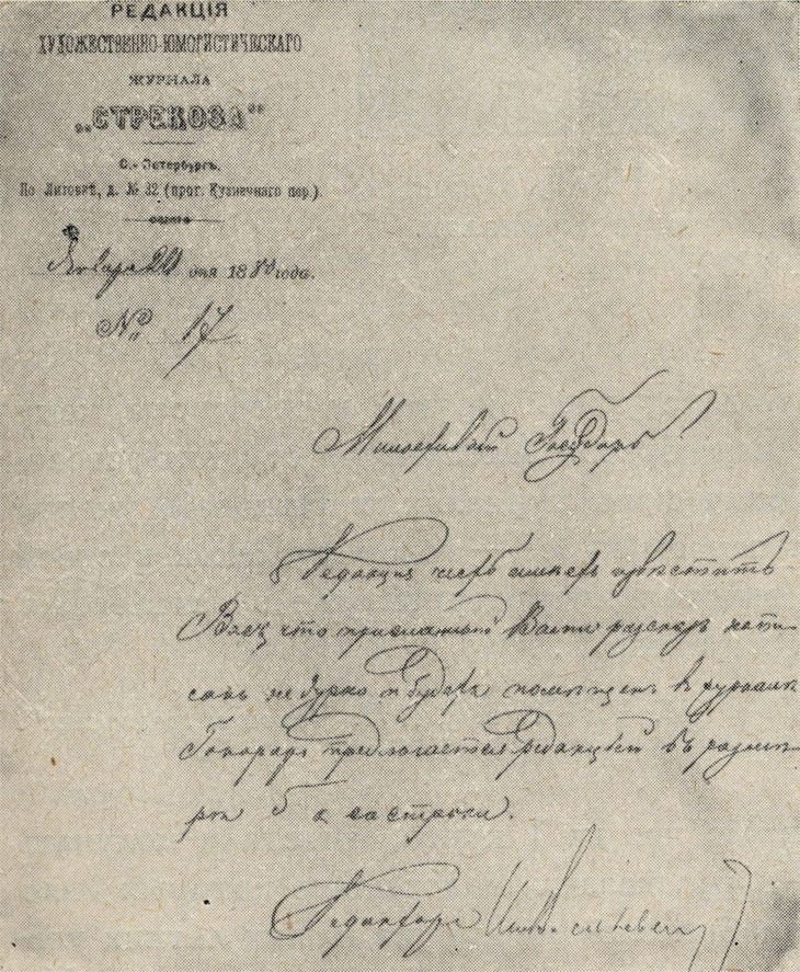 Письмо редакции журнала "Стрекоза" Чехову с извещением о принятии рассказа в печать. 1880